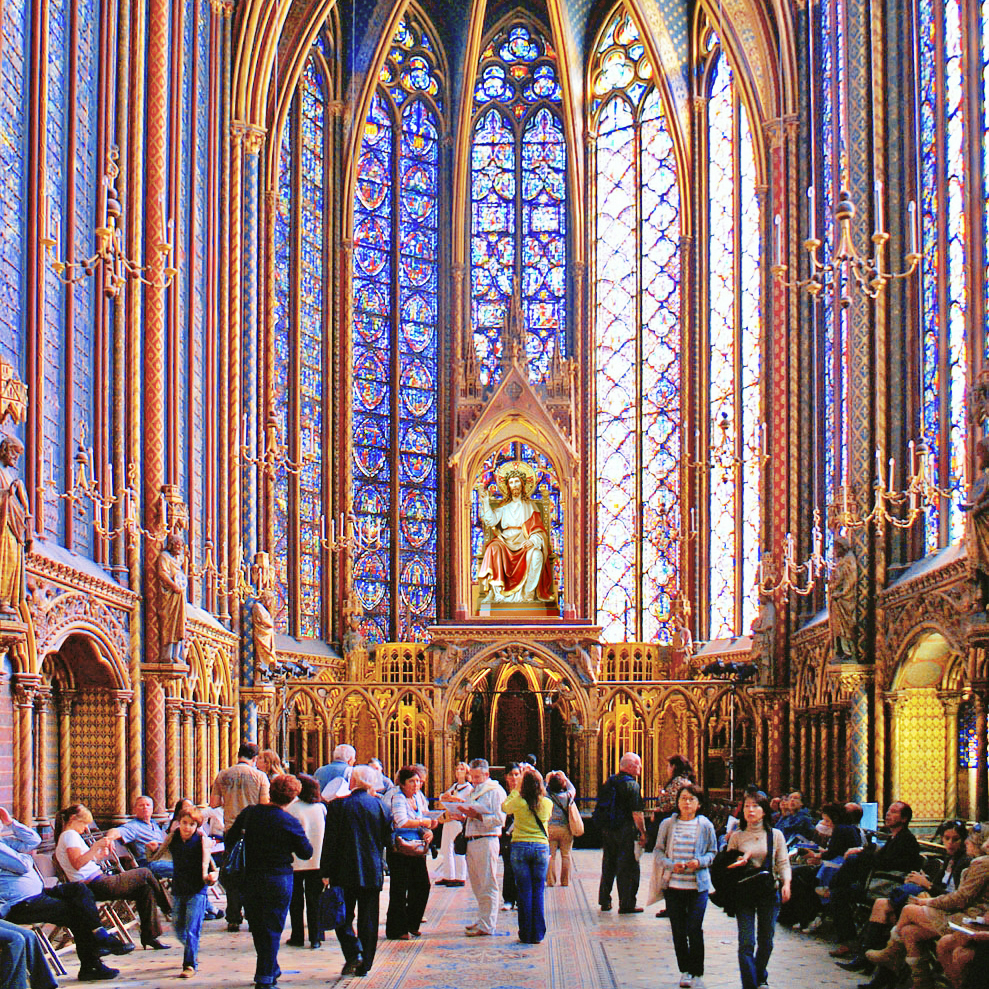 La Sainte Chapelle avec le Christ en Majesté manquant rajouté sur photoshop